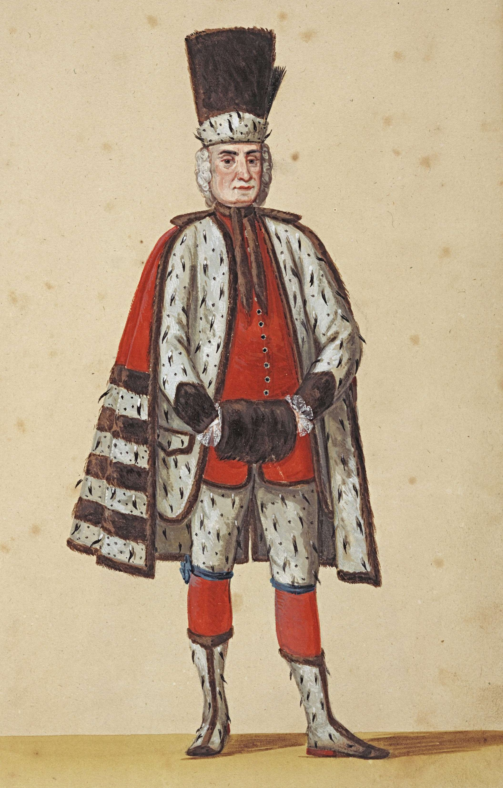 August der Starke als Kürschner, Aquarell, Landeshauptarchiv Dresden. Mit Hermelincape, -jacke, -hose und -schuhen sowie Muff und Besatz aus zweiter Pelzart. Siehe dazu [1].